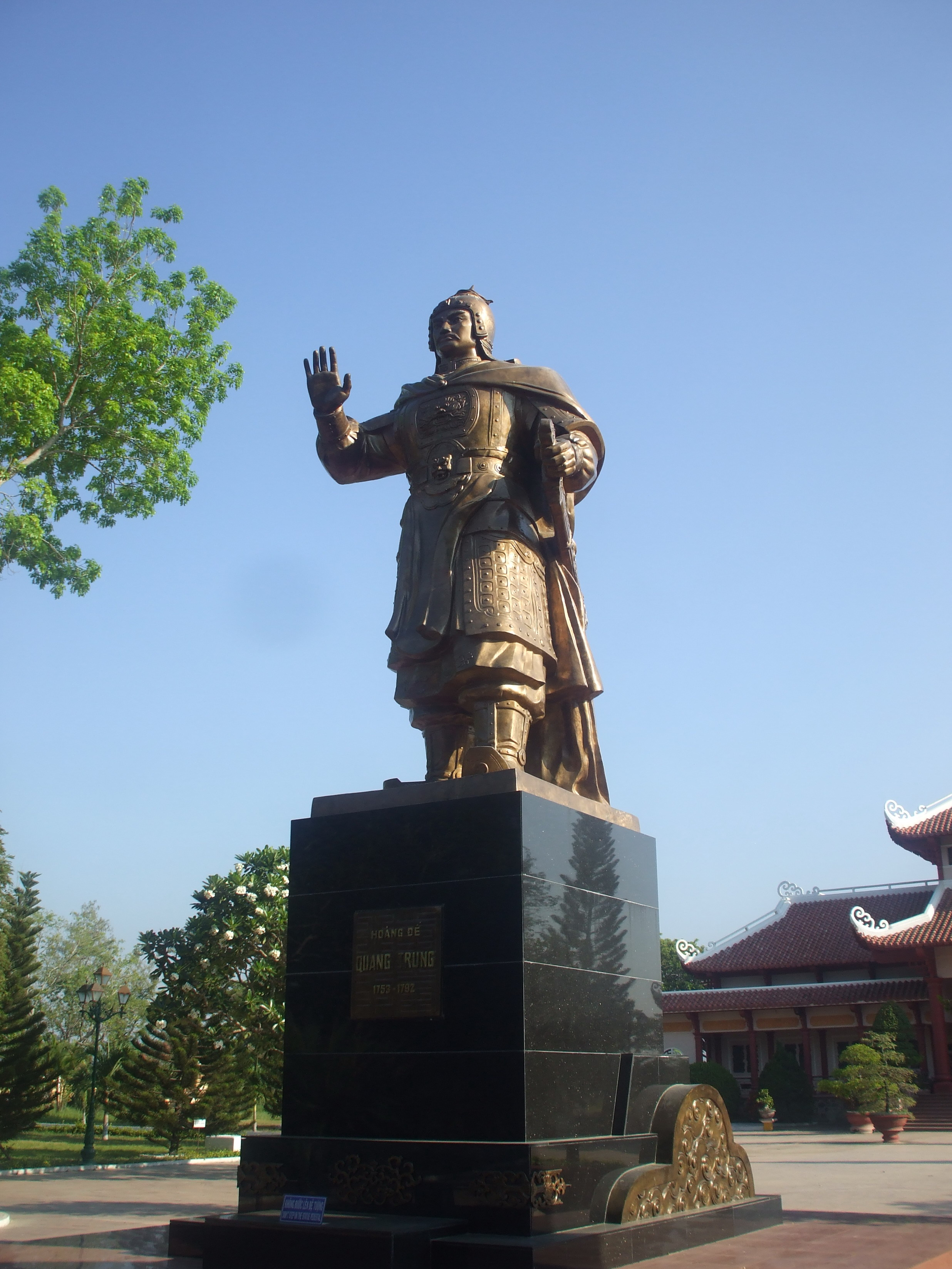 Tượng đài Quang Trung trước Bảo tàng Quang Trung (Bình Định, Việt Nam).